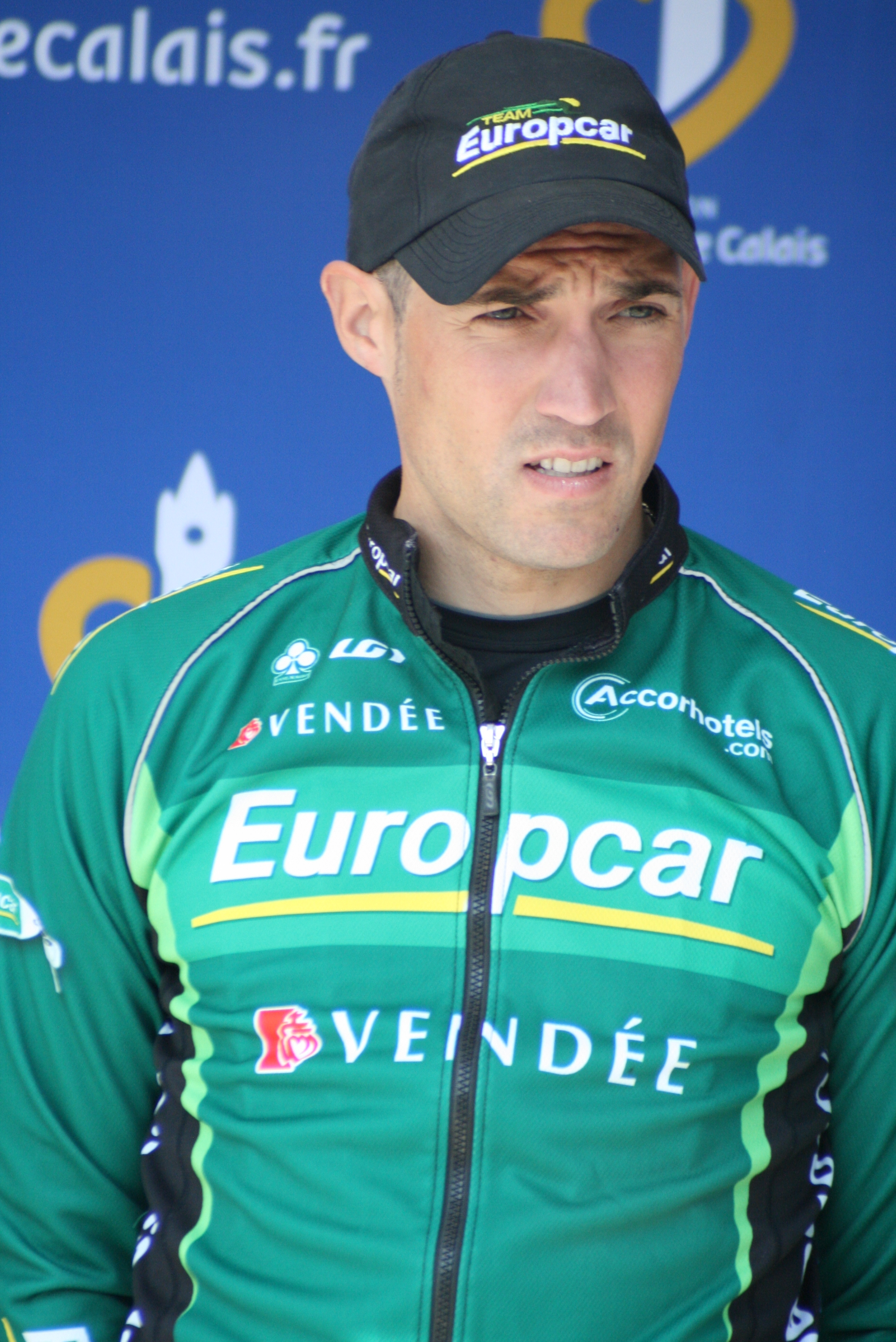 Présentation des coureurs au départ de la première étape Mathieu Claude